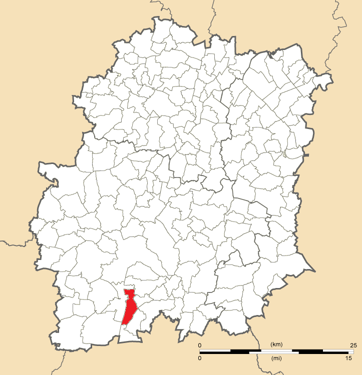 Carte de position de Saint-Cyr-la-Rivière en Essonne (91)